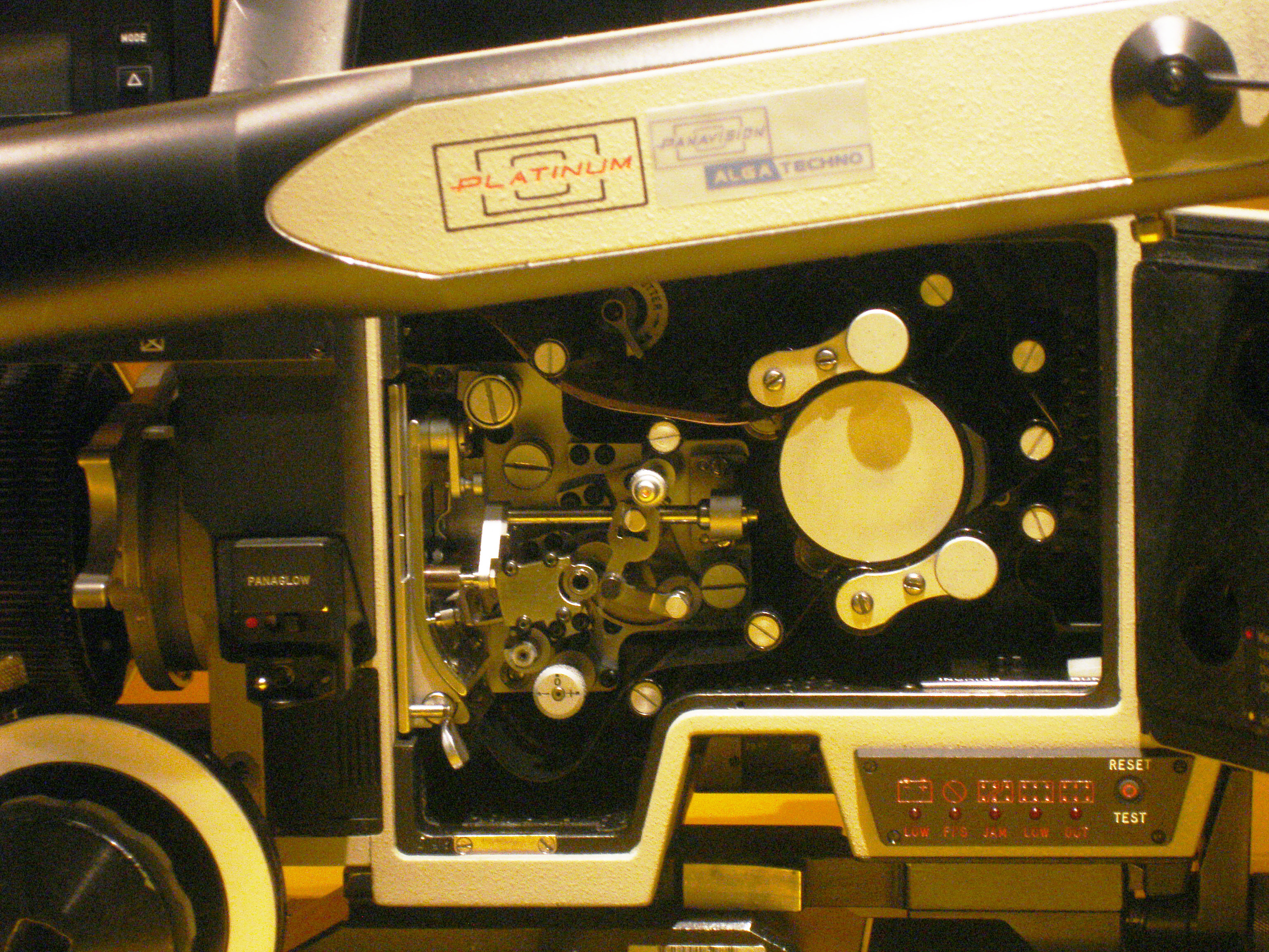 Caméra film 35 mm Panavision modèle Platinum (1986). Ouverte pour chargement. Mécanisme d'entraînement.